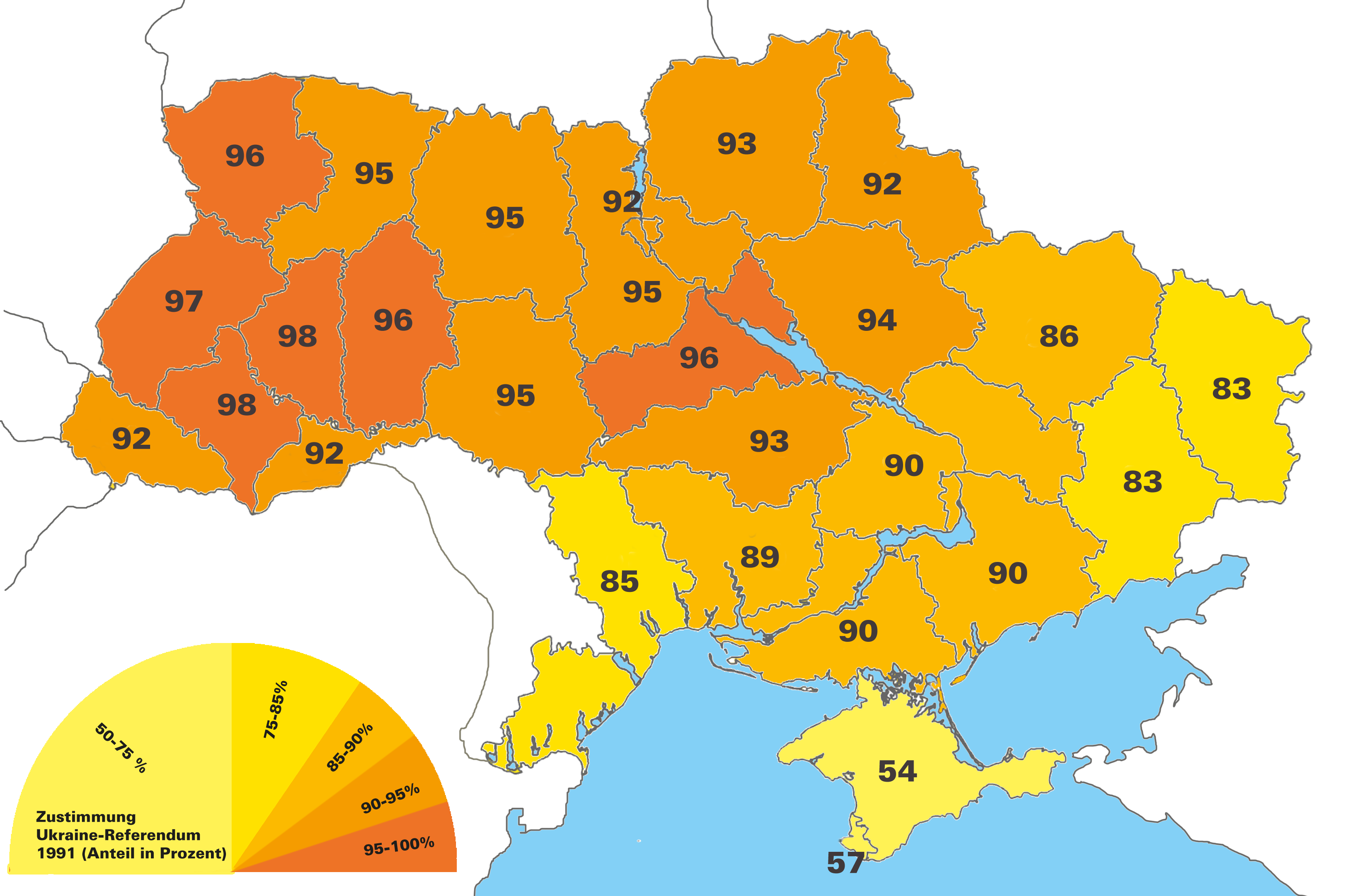 Ukraine-Referendum 1991 in Anteilen in Prozent